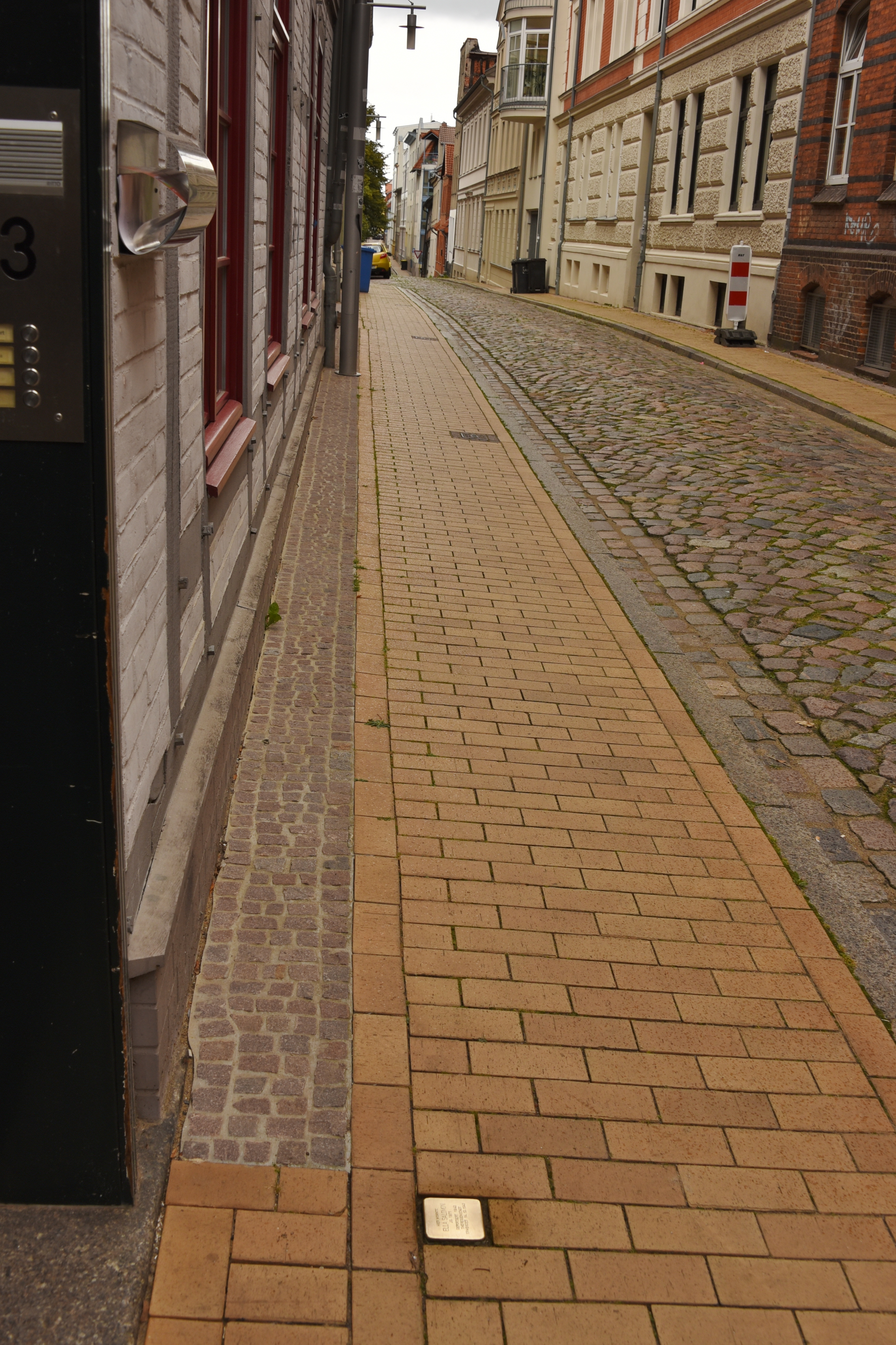 Stolperstein in Schwerin